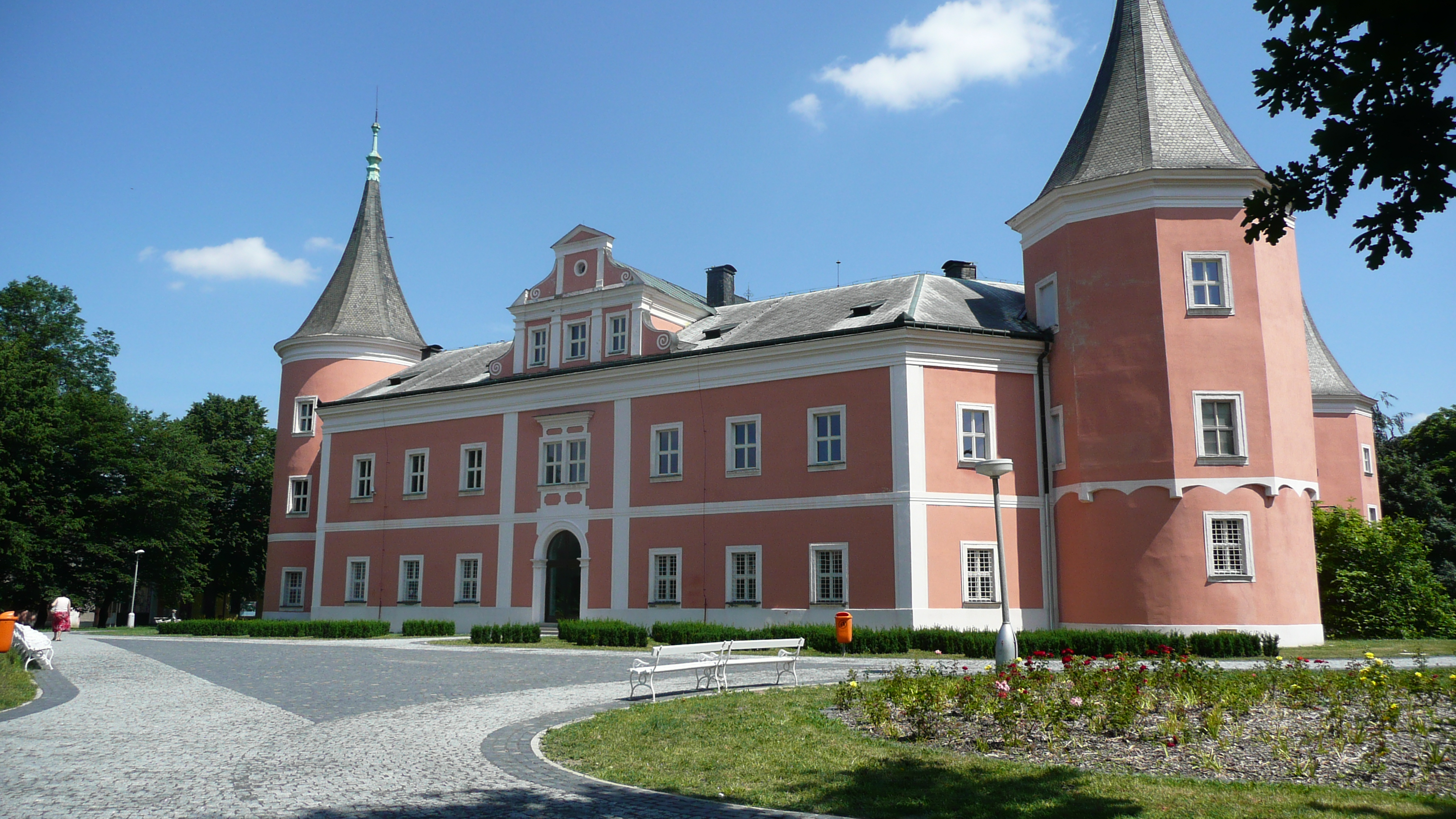 Sokolovský zámek.